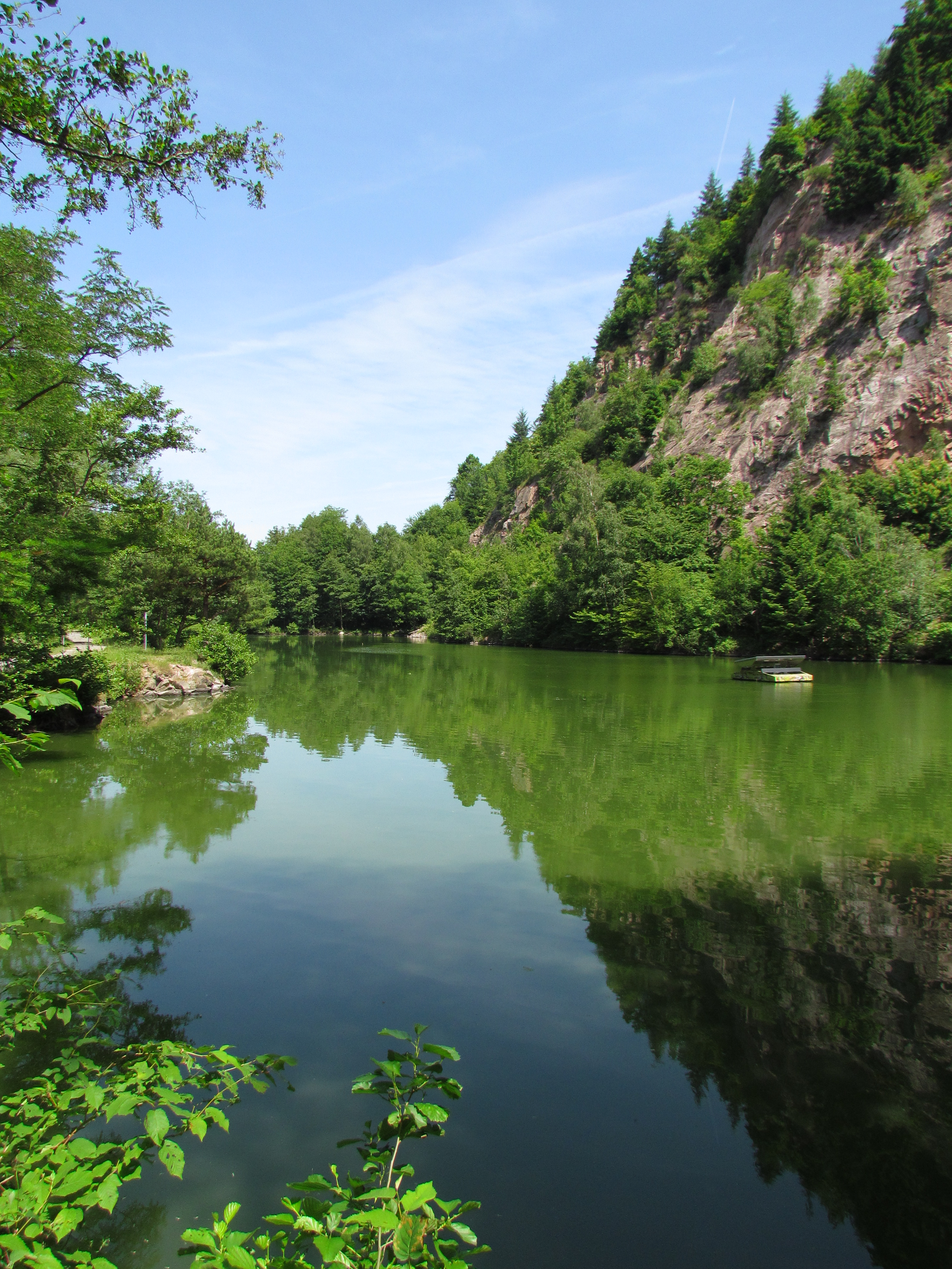 Bildinhalt: Der Petersee (Waldenecksee) zwischen Baden-Baden und Sinzheim im Sommer vom süd-westlichen Ufer aus fotografiert Aufnahmeort: Sinzheim, Deutschland